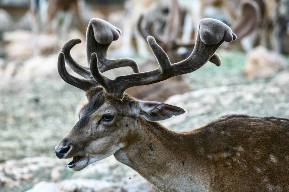 أيل أسمر أوروبي في غابات برقش.